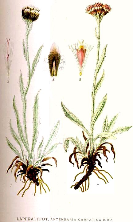 Antennaria lanata (Hook.) Greene, syn. Antennaria villifera Boriss. : Lappkattfot, Antennaria villifera Boriss., syn. Antennaria carpatica auct. Original Description Lappkattfot, Antennaria carpatica R. Br.